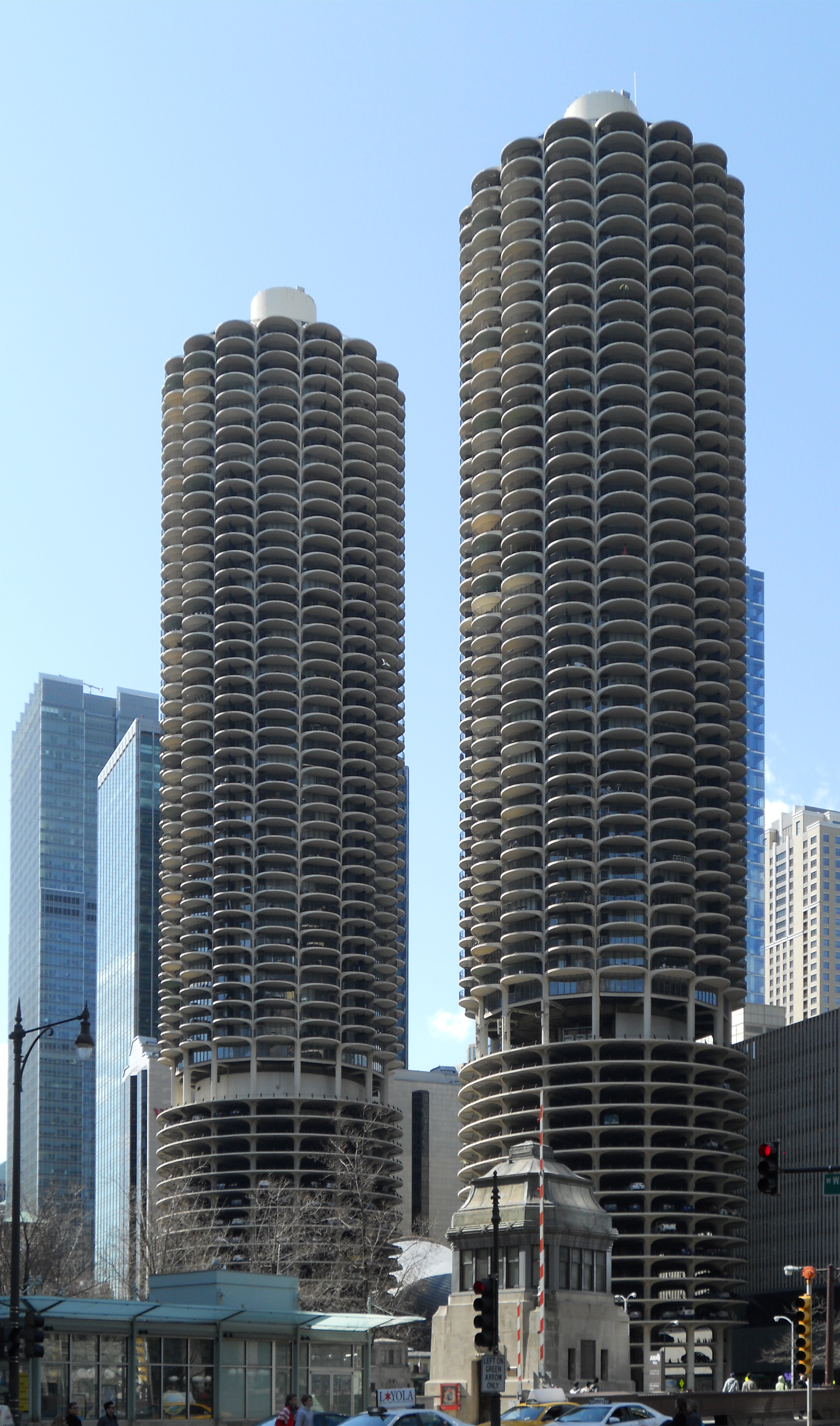 Marina City Chicago 2015